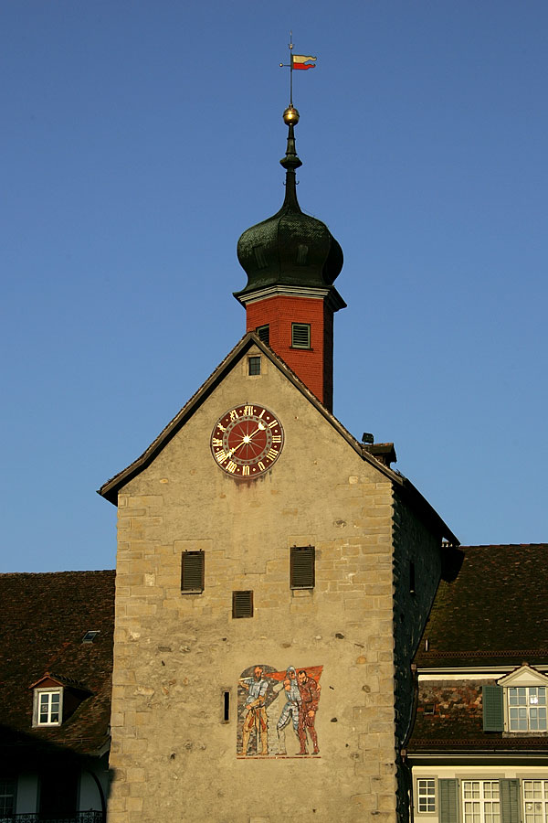 Bogenturm in Bischofszell